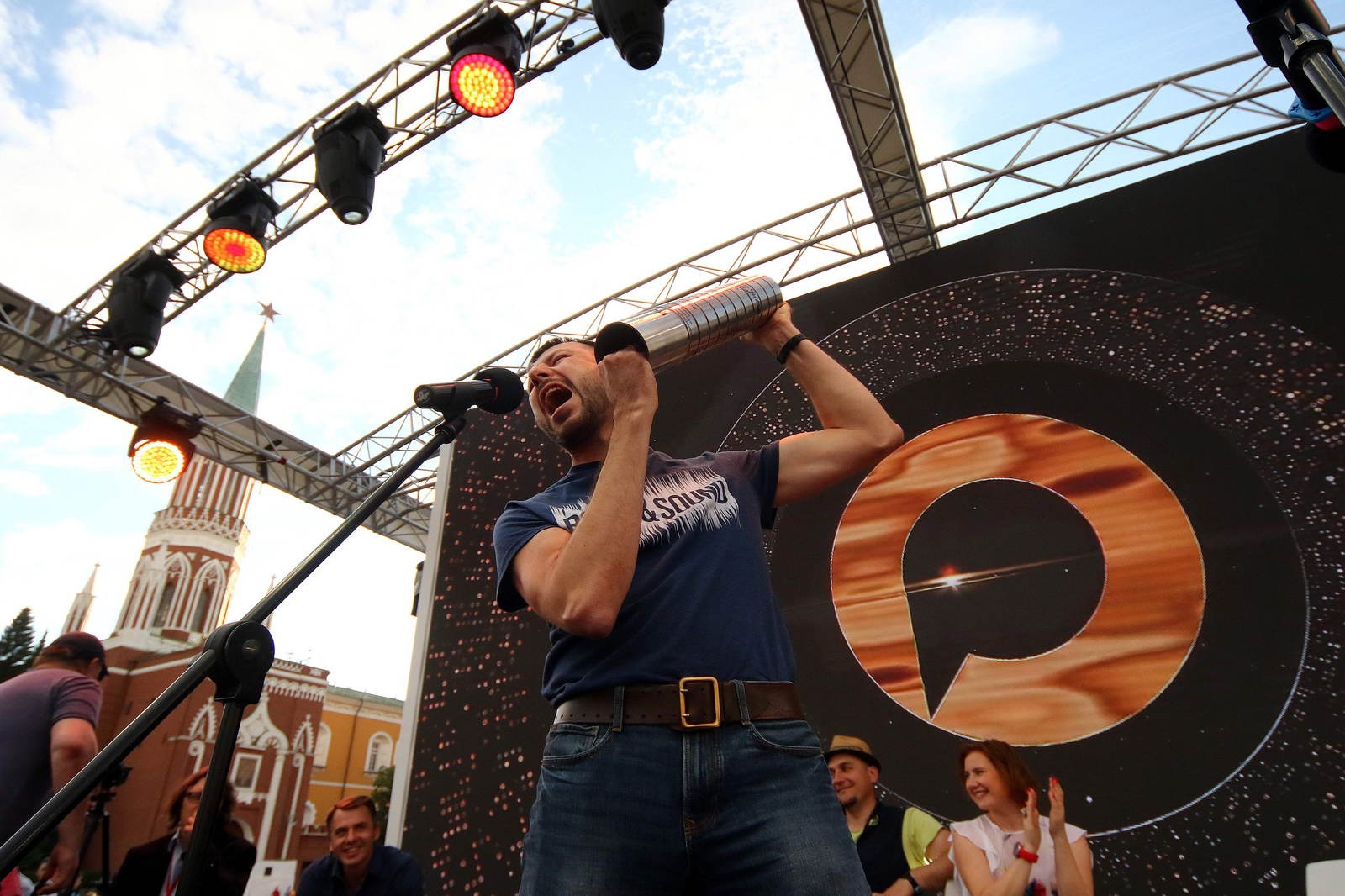 Чемпион по чтению вслух сезона «Открой Рот» 2018 – 2019 Сергей Бельчиков на Красной Площади